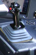 Sidestick